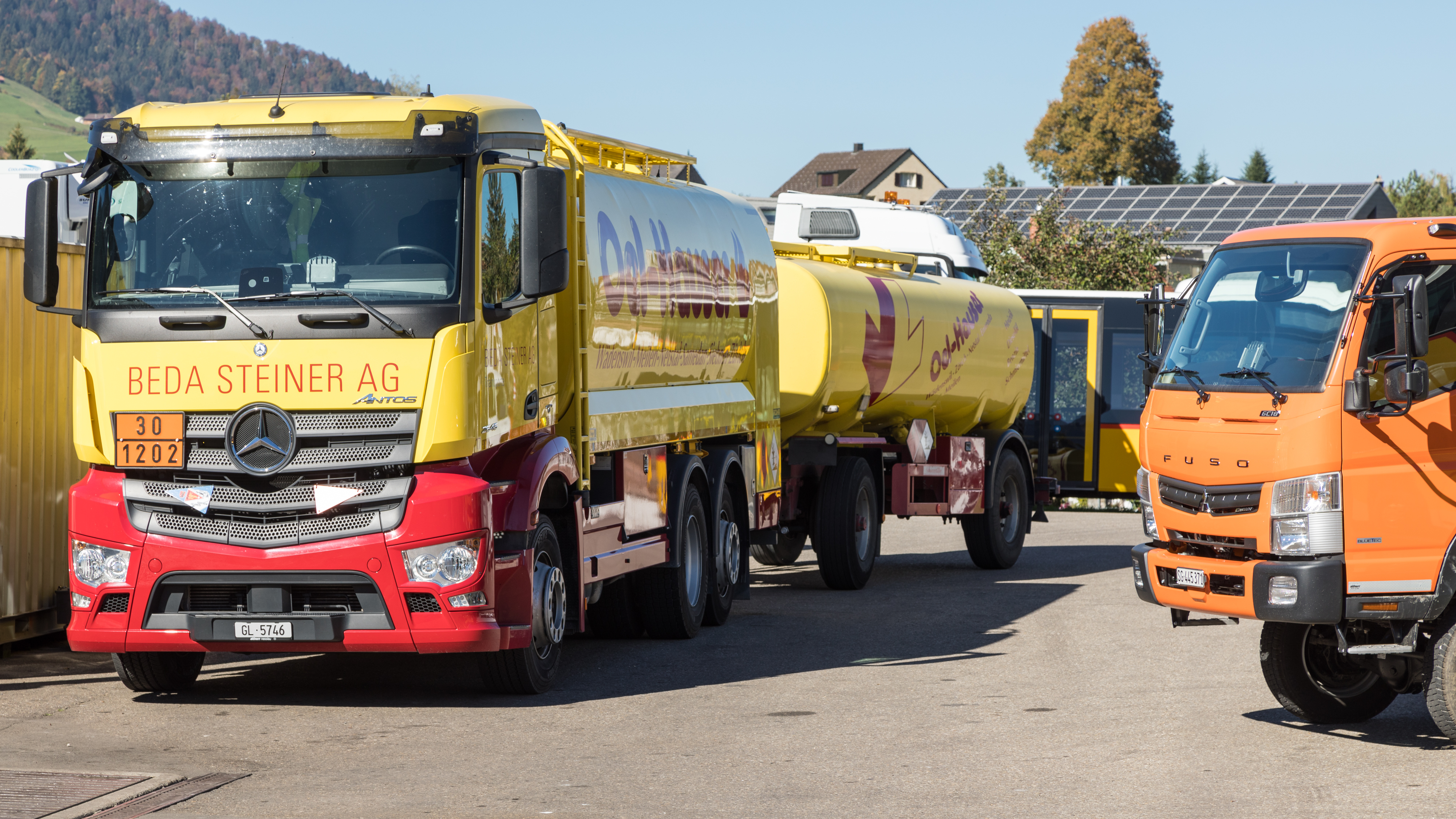 Mercedes-Bank Antos 2545 Tanklastzug mit 2,30m Fahrerhaus.